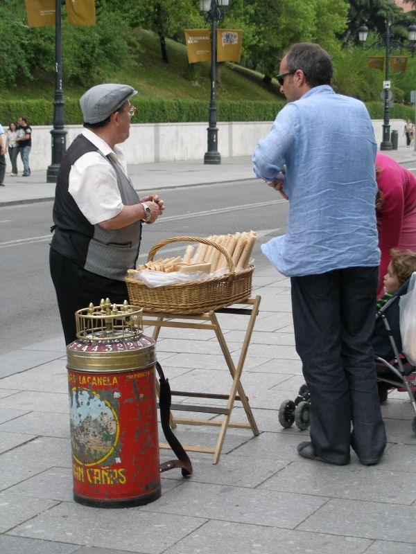 Barquillero at MadridBarquillero